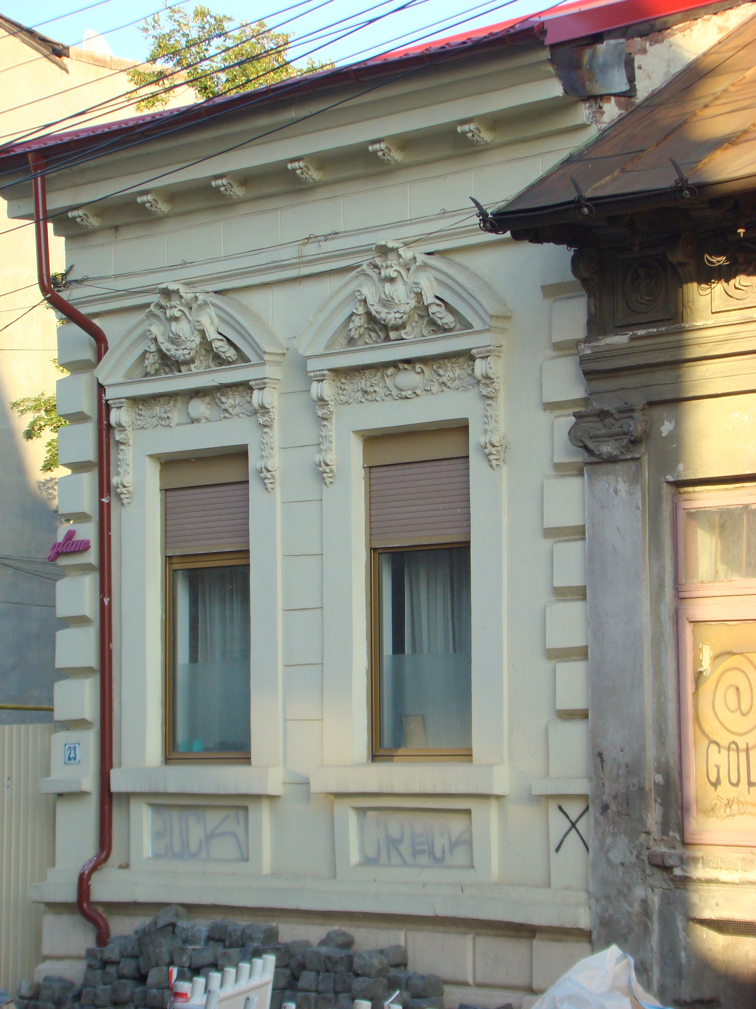 Clădire monument istoric, str. Mircea Vulcănescu, nr.23